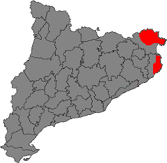 Àrea de la Denominació d'Origen Empordà